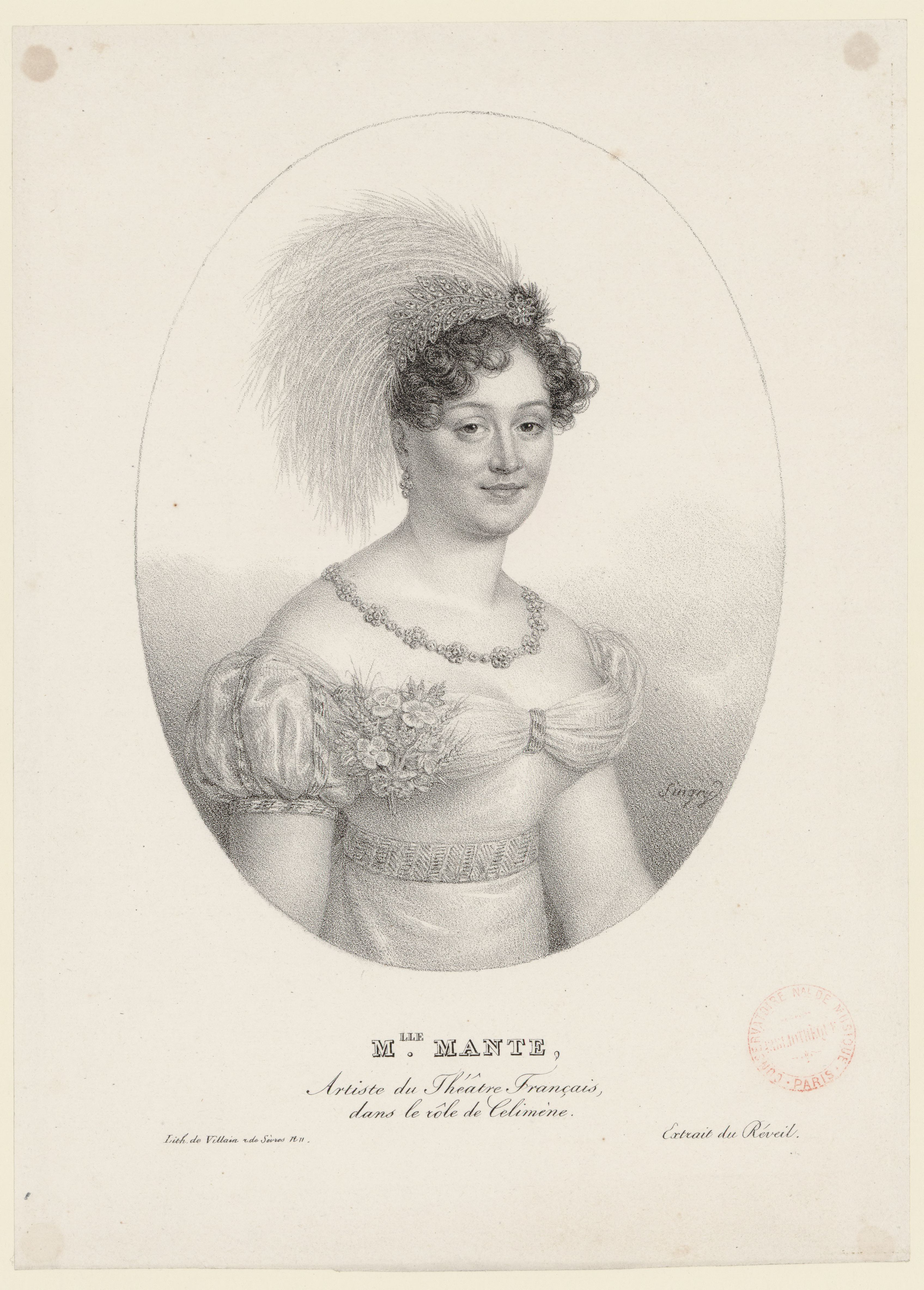 Mademoiselle Mante, artiste du Théâtre Français, dans le rôle de Célimène.Lithographie de Villain, d'après un portrait de Singry.